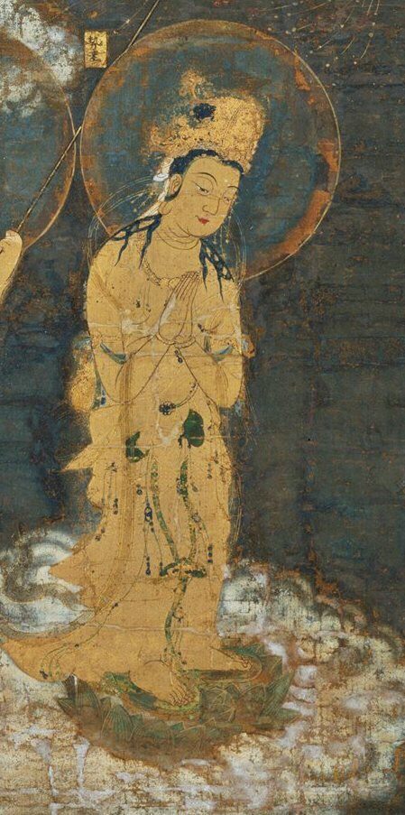 Japan; Hanging scroll; Paintings